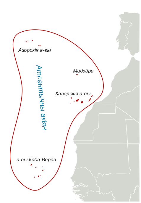 Макаранезія